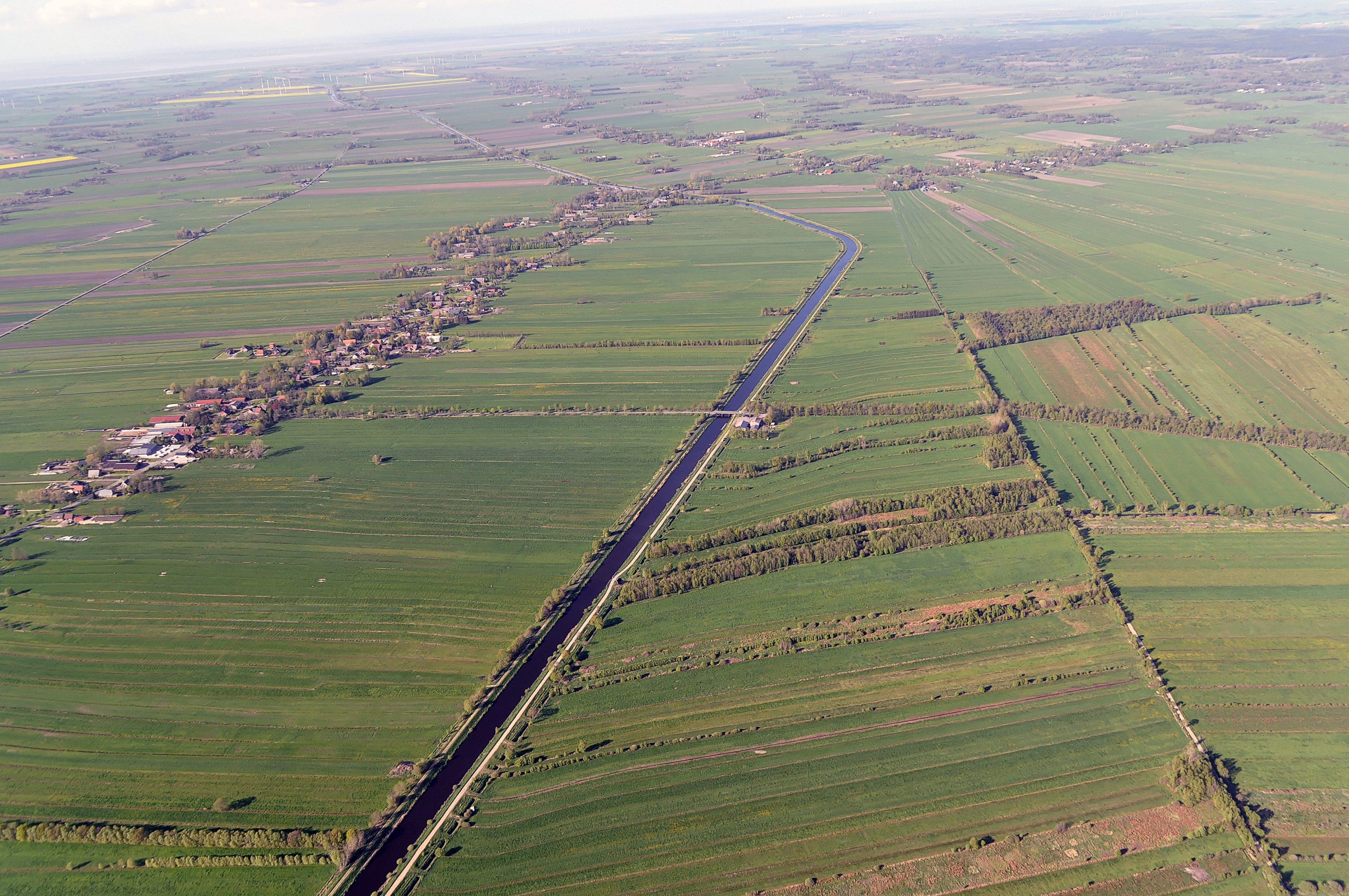 Luftbilder von der Nordseeküste 2012-05